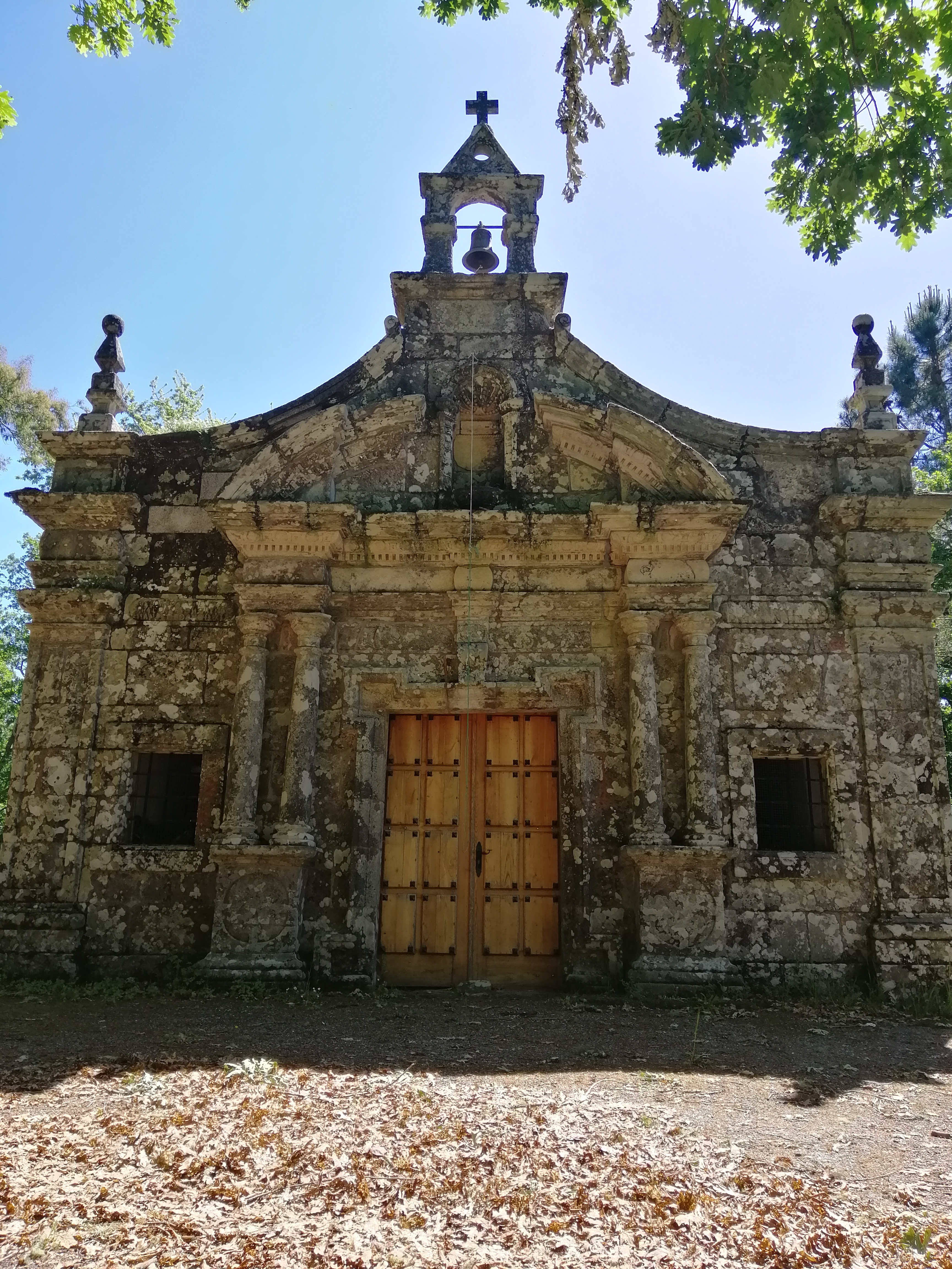 Vista frontal da capela da Magdalena, situada en Garabelos. Este templo semella á igrexa de San Lourenzo.